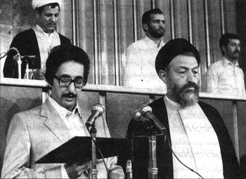 مراسم تحلیف بنی صدر